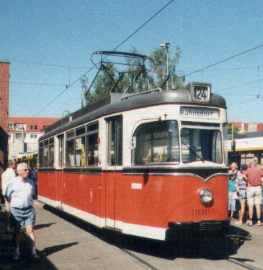 Berliner Straßenbahn TDE 58 von 1958, Privatarchiv Norbert Radtke.